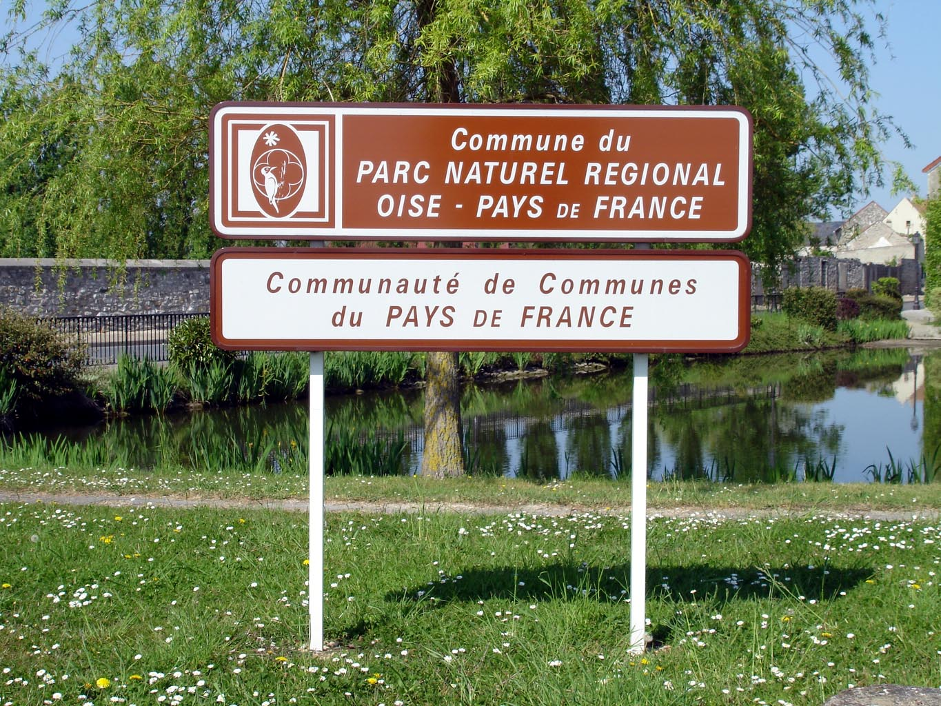 Panneau d'appartenance au Parc naturel regional Oise - Pays de France à Villiers-le-Sec (Val-d'Oise), France Avril 2007 Photo personnelle de Clicsouris Autre version